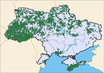 Поширеність представників родини Зозулинцеві (Orchidaceae) на території України